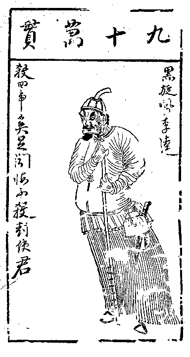 明 陈老莲 木刻版画 水浒叶子 李逵